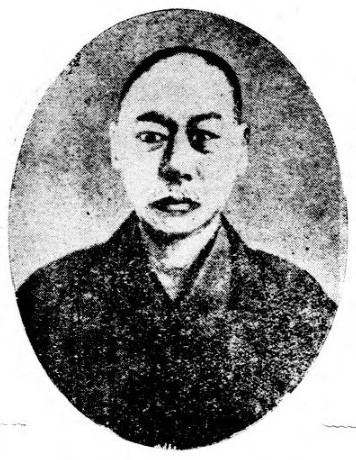 菊池武臣男爵（1850～1919）